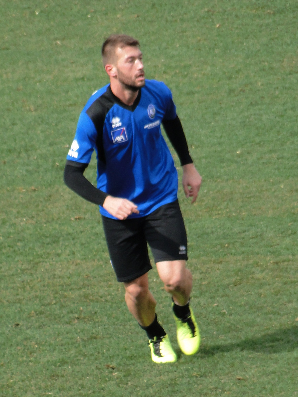 Michele Canini, calciatore italiano